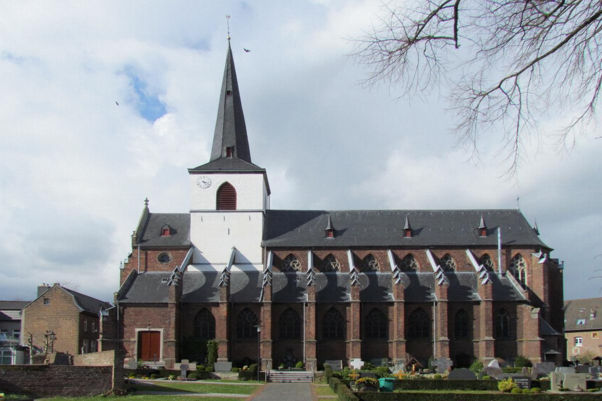 Kirche in Gangelt